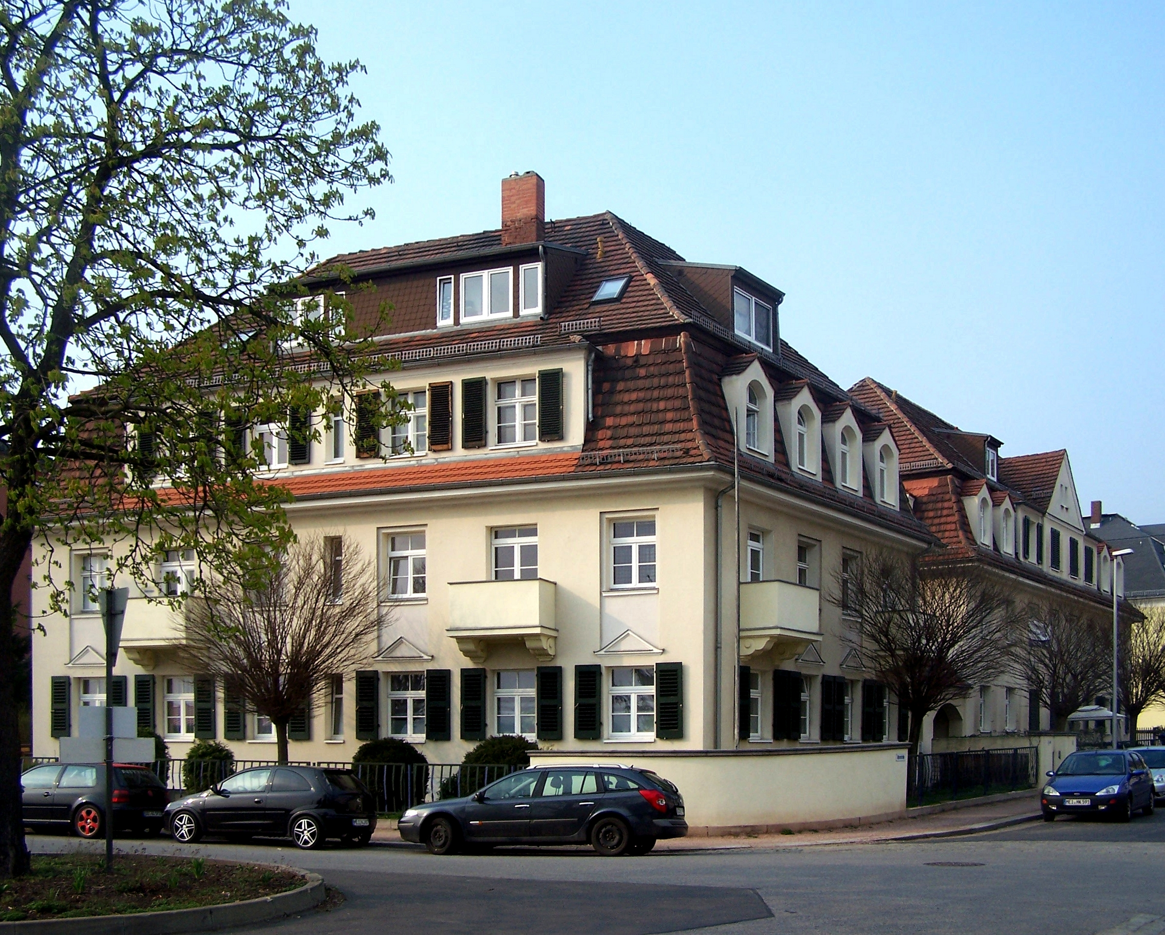 Radebeul, Wohnanlage Ahornstraße, Ahornstr. 5/7 u. 9